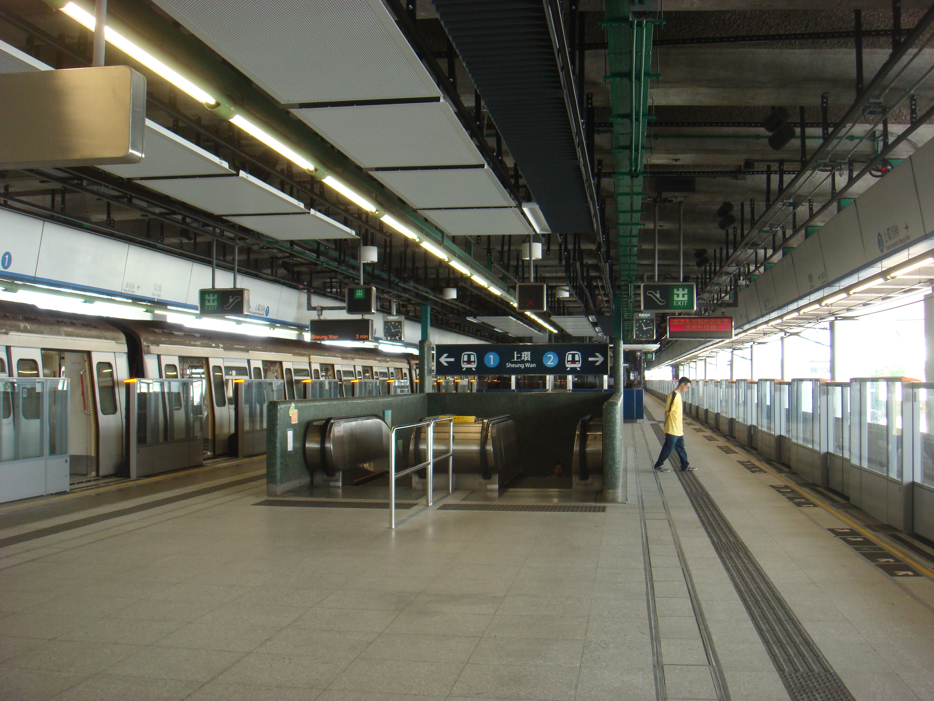 柴灣站月台